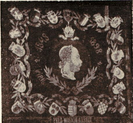 The mosaic made of fur shows the emperior Franz Joseph I of Austria Wandteppich. Entworfen und ausgeführt von G. Radda. Wien. Grösse: 2 m. 65 cm. Breite und 2 m. 30 cm. Höhe. Der Teppich zeigt oben in der Mitte den Reichsadler, links und rechts reihen sich daran die Wappen der 22 Reichsländer Österreich-Ungarn's. Ueber jedem dieser Wappen ist die entsprechende Krone, dazwischen Eichen, und Lorbeerranken. Unter jedem Wappen der Name des Kronlandes In der Mitte des Teppich's das Bild Kaiser Franz Josef's. Darunter der Wahlspruch: Viribus unitis. Der Teppich wurde für die Ausstellung bei Gelegenheit des 50 jähr. Regierungsjubileum angefertigt; deshalb die Jahreszahlen 1848-1898. Alle Teile dieser hervorragend künstlerischen Arbeit sind aus Pelzstücken und ohne Ausnahme in den Grund eingenäht. Verwendet wurde besonders: Sealskin, Sealbisam, Hermelin, Seehund, Fischotter, Murmel, Nutrias und Lammfelle. Diese Letzteren, wurden auch in rot-blau-grün und gelbgefärbt angewendet. Die Ausführung dieser Arbeit benötigte 2 ½ Monate. Tapis décorativ, fait par G. Radda, Vienne (Autriche). Decorative Carpet made by: G. Radda, of Vienna (Austria).